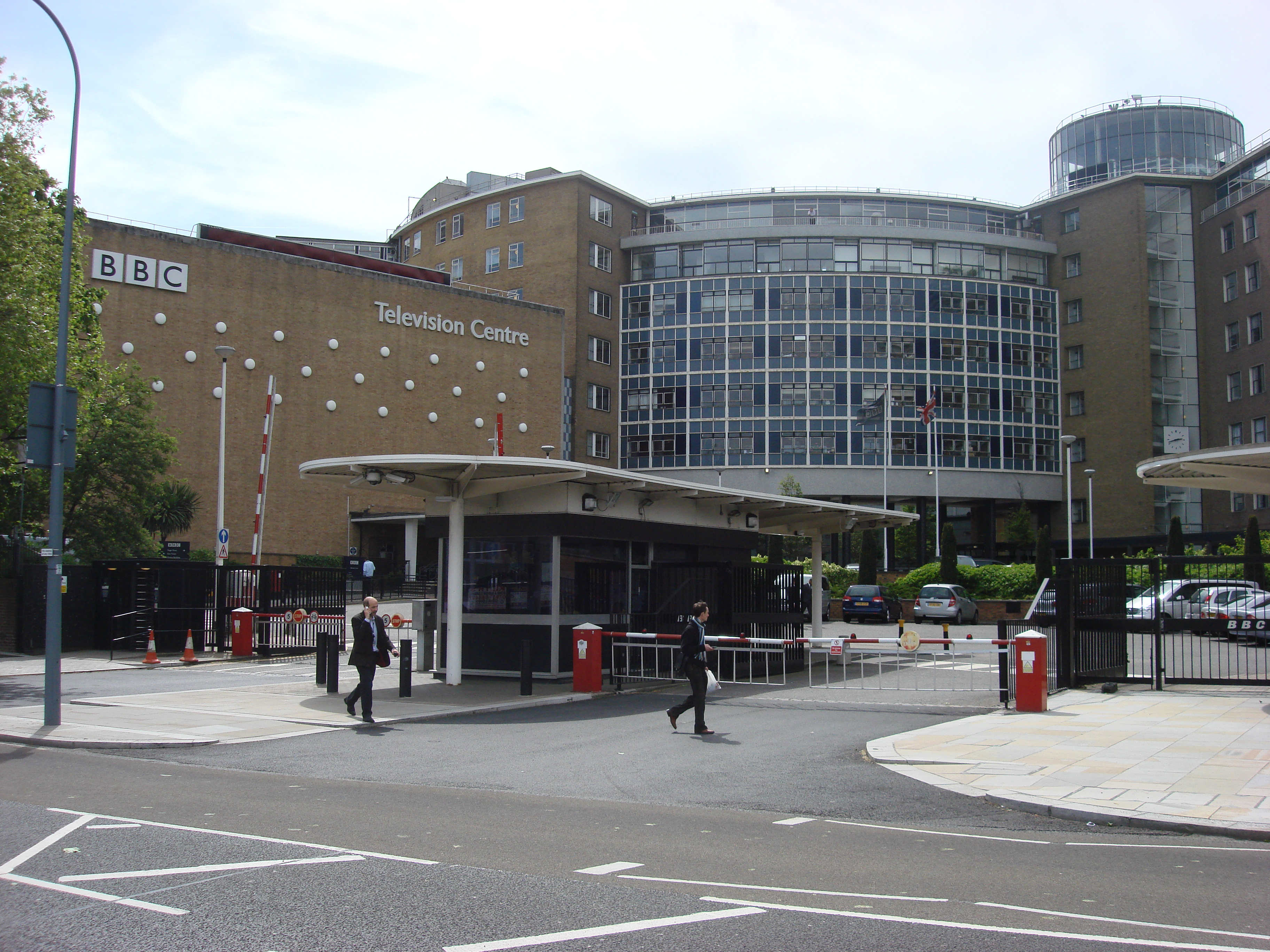 BBC TV Centre